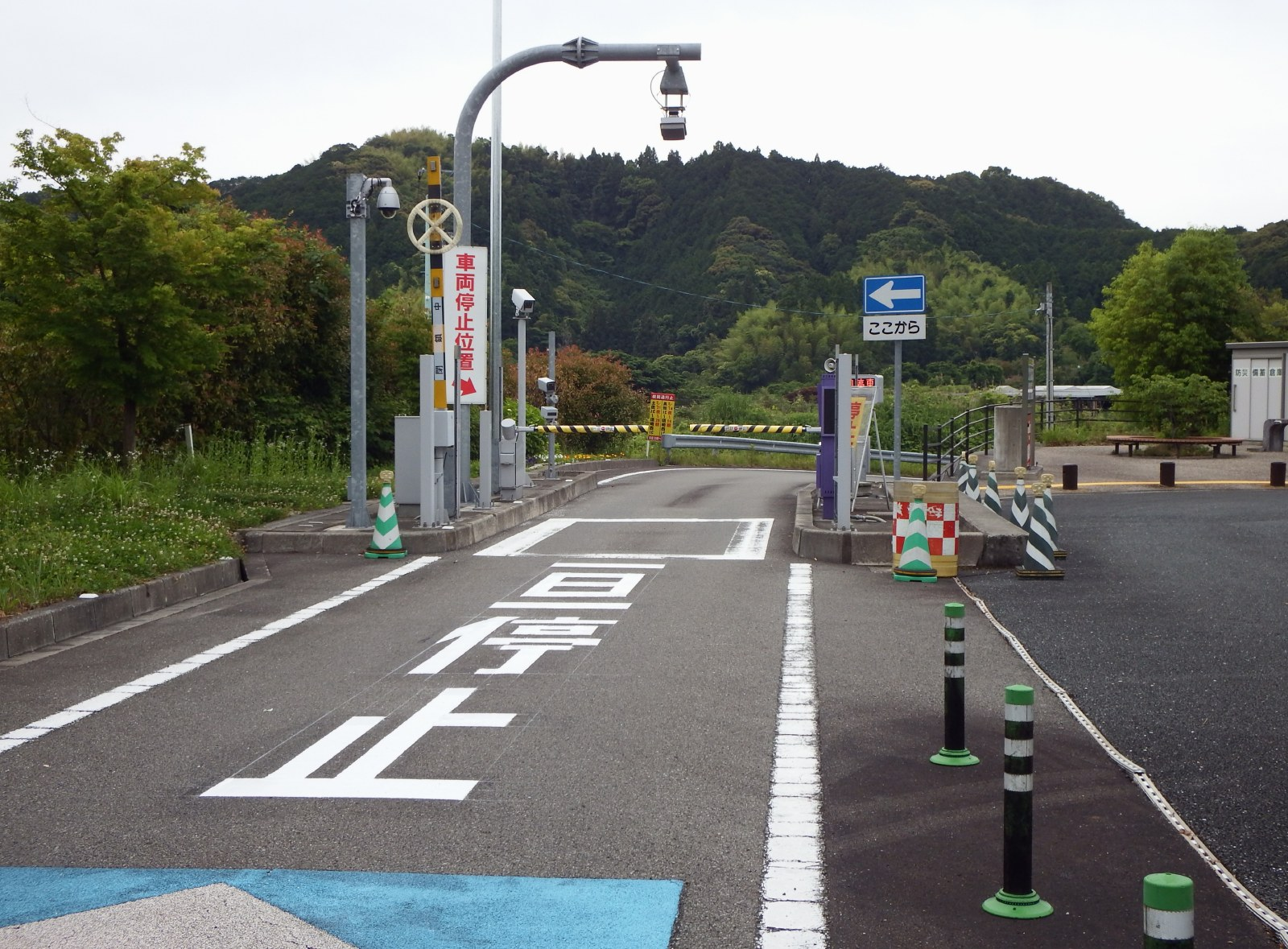 土佐パーキングエリアのスマートIC